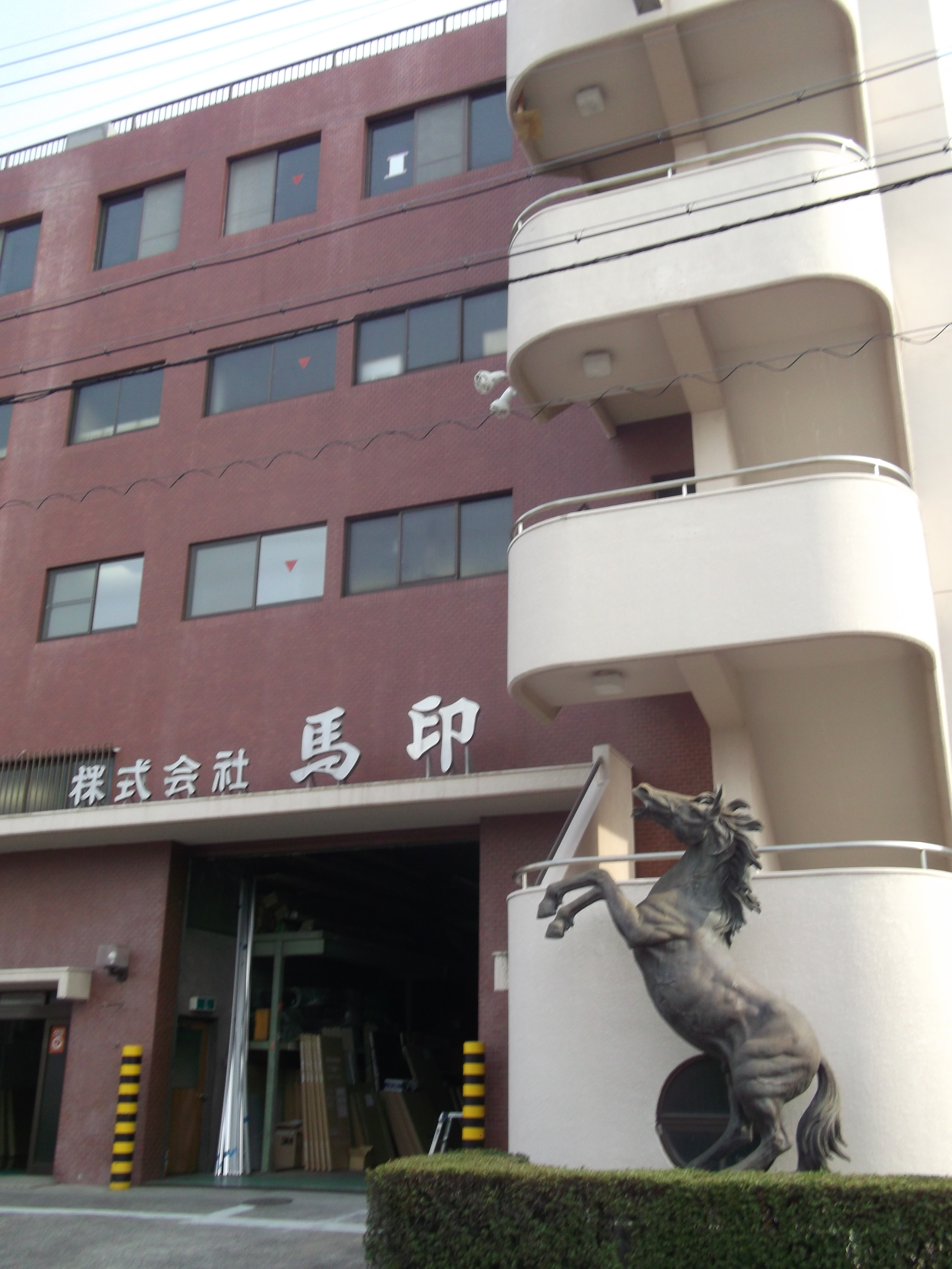 名古屋市中川区山王三丁目に所在する馬印本社を北側公道より写す